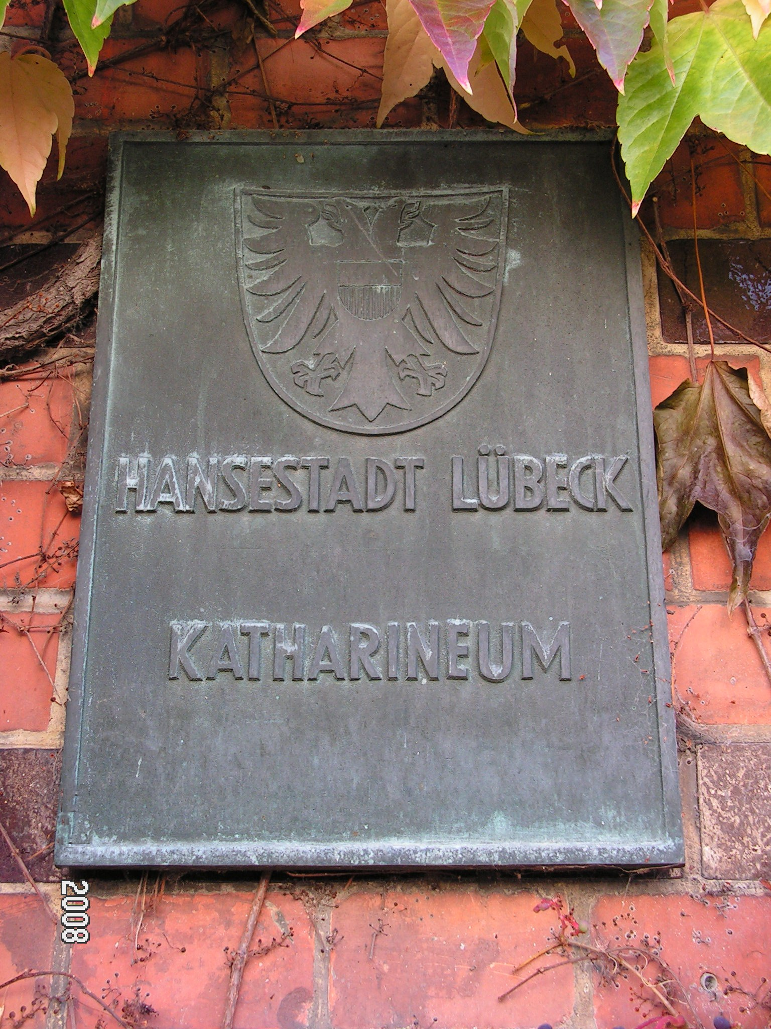 Lübeck/Schild am Eingang des Katharineums